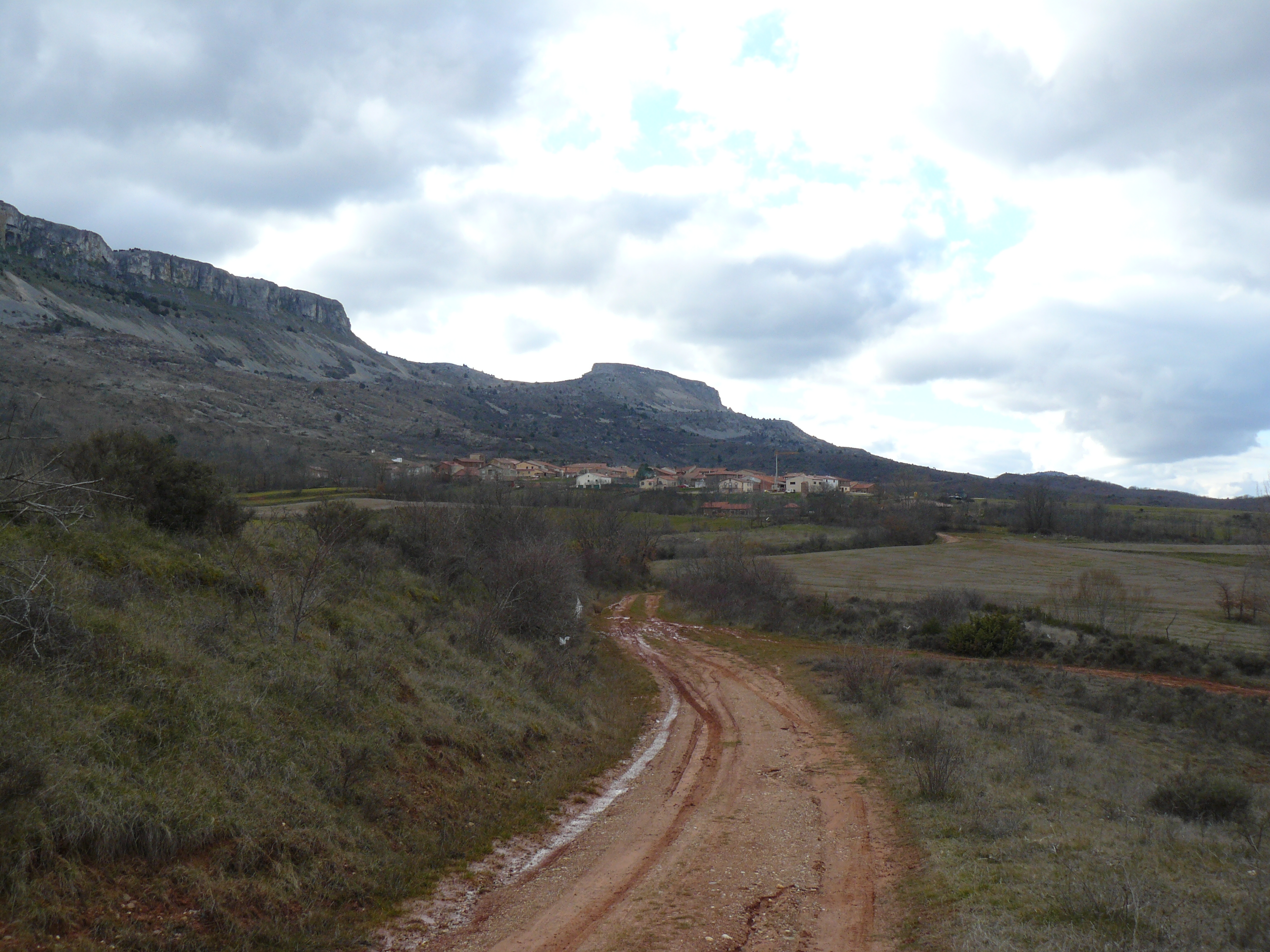 Ahedo, municipio de La Revilla y Ahedo, Burgos.